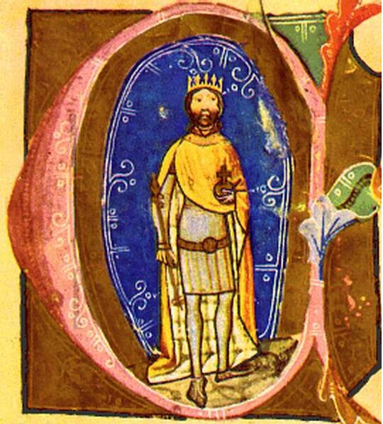 Emeric of Hungary